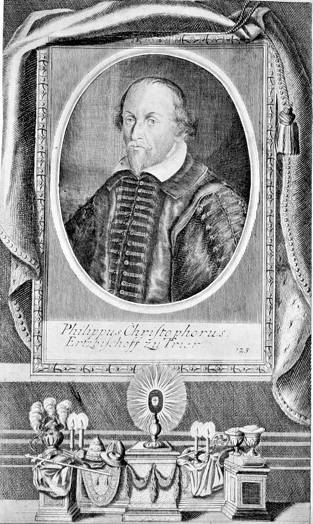 Philipp Christoph von Sötern, Bischof von Trier und Speyer